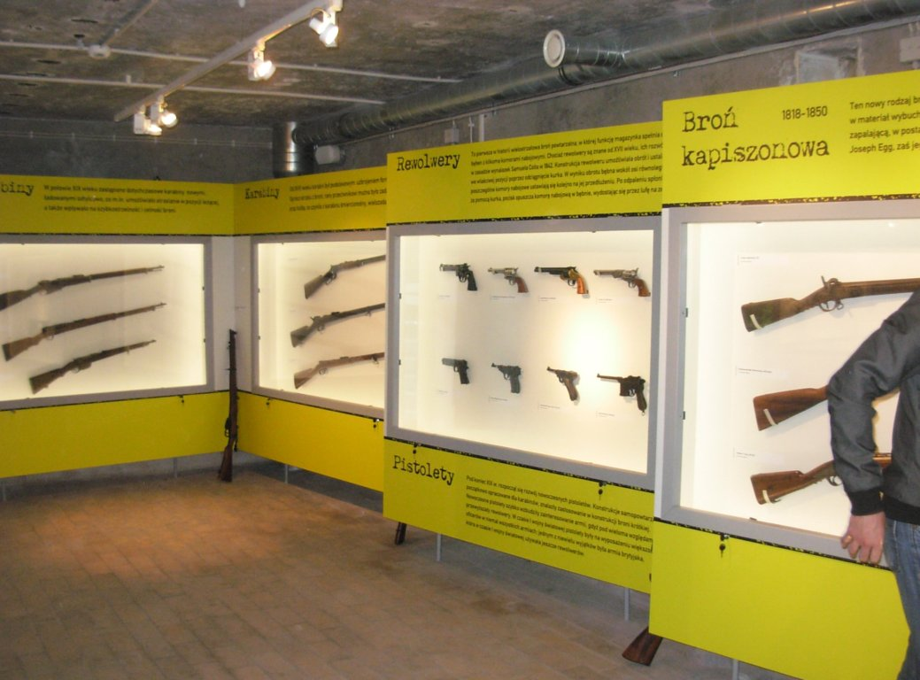 Eksploseum w Bydgoszczy - ekspozycja uzbrojenia (broń strzelecka)